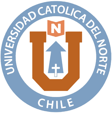 Emblema de la Universidad Católica del Norte.